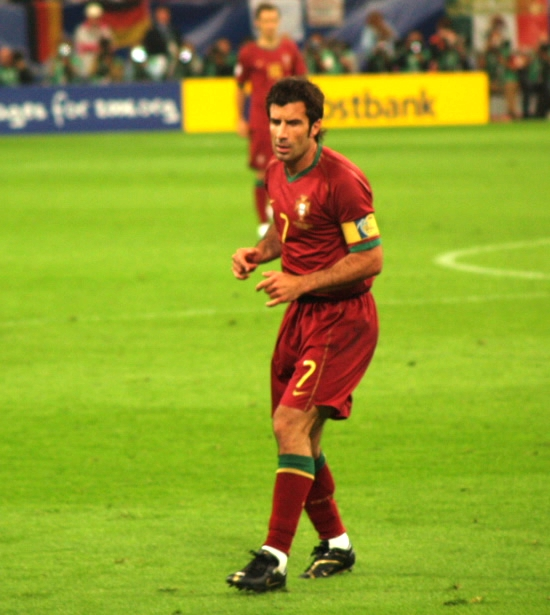 Luis Figo playing with Portuguese team.(Luis Figo spielt bei der portugisieschen Nationalmannschaft)